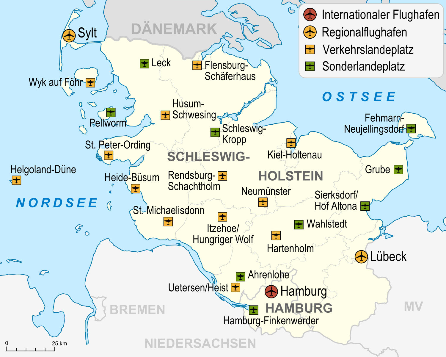 Flughäfen, Verkehrslandeplätze, Sonderlandeplätze und Wasserlandeplätze in Schleswig-Holstein, Stand 2007